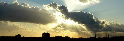 De skyline van Woerden tijdens een zonsondergang in maart.